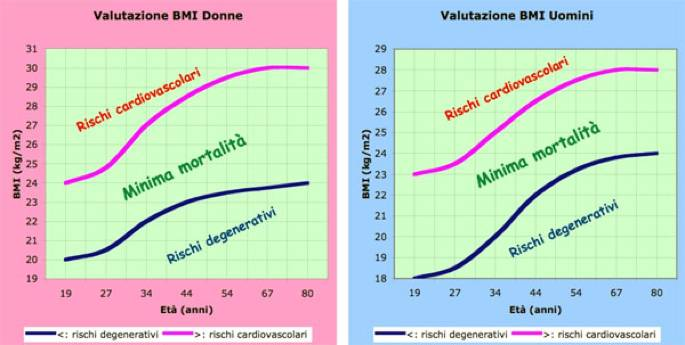 Titolo: Peso corporeo umano e mortalità